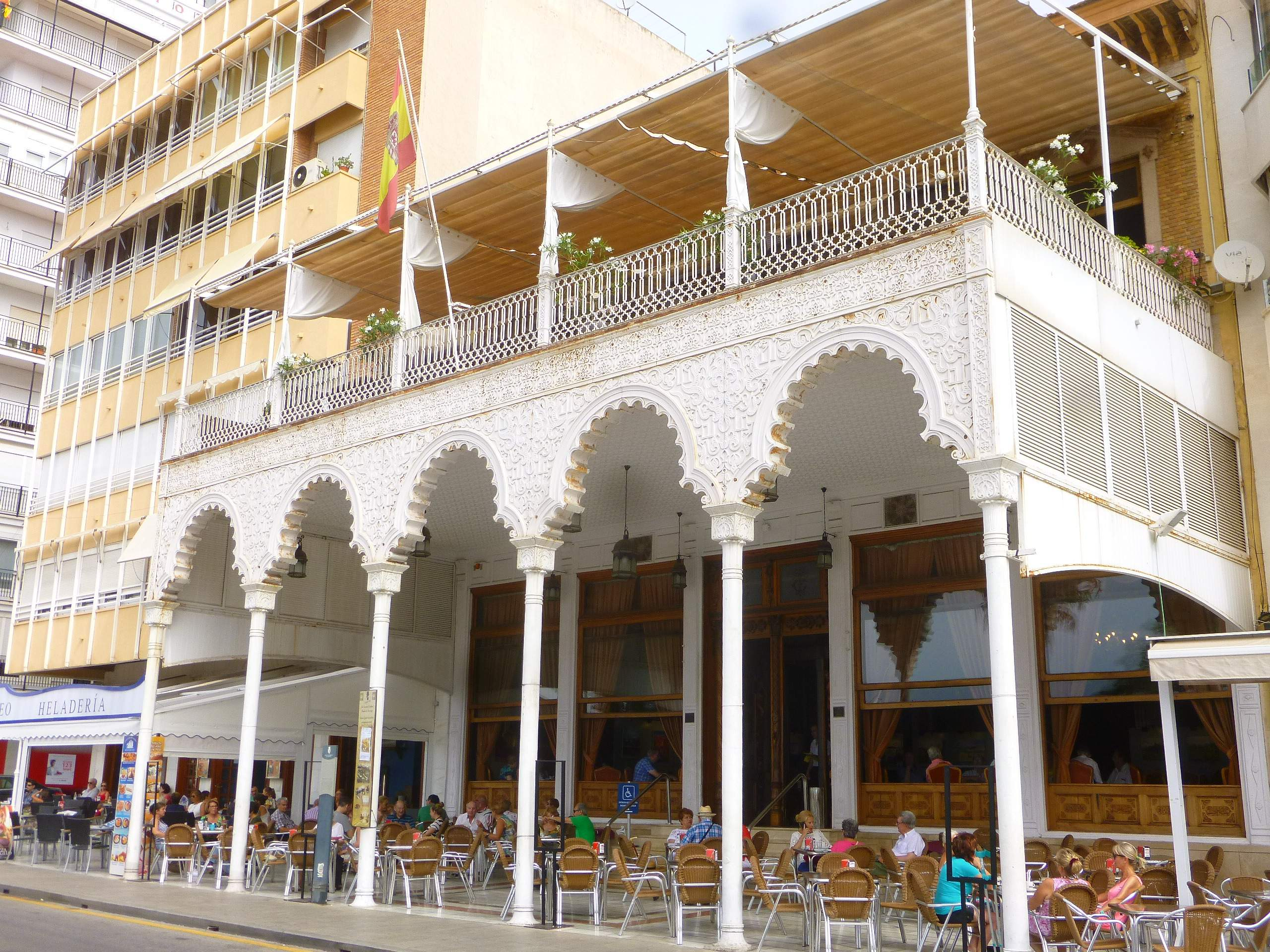 Torrevieja (Alicante) - Sociedad Cultural Casino de Torrevieja